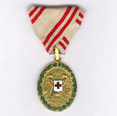 Osztrák Vöröskereszt Díszjelvényének Bronzérme hadidíszítménnyel